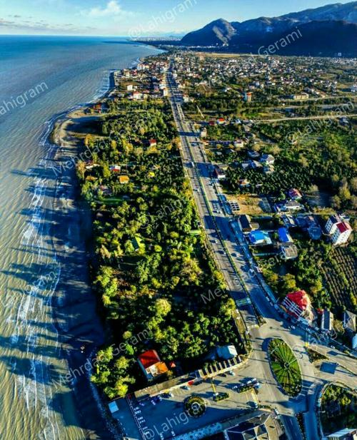 ، رطوبت مطلوب و هوای بسیار سالم و مناظر ابدی از سبزی کوهتا آبی دریا فاصله کمتر از یک کیلومتر بین دریا و کوه